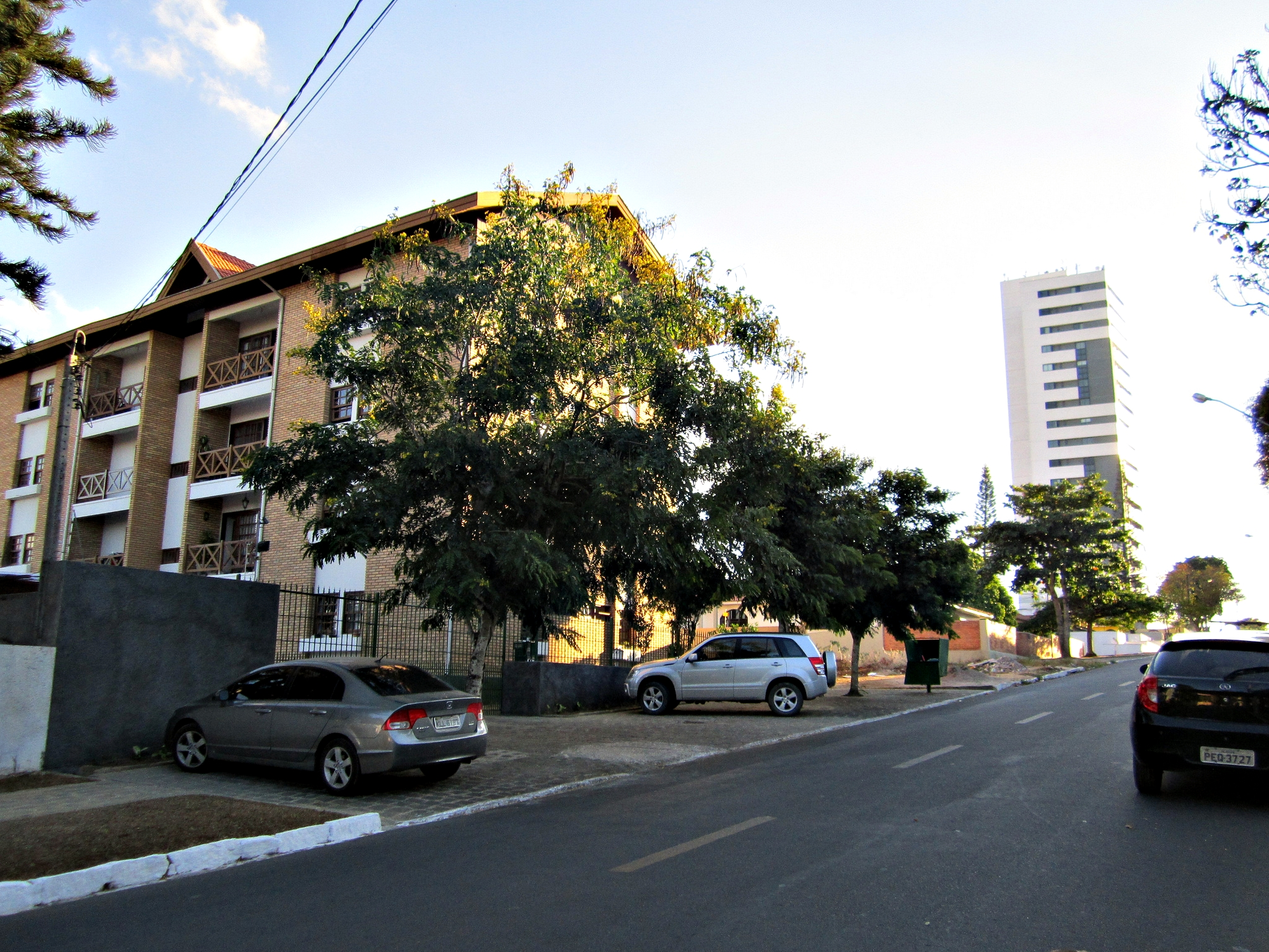 Garanhuns - Pernambuco - Brasil